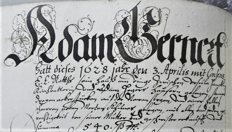 Auszug des Stadtbuchs, Initialiendarstellung um 1682